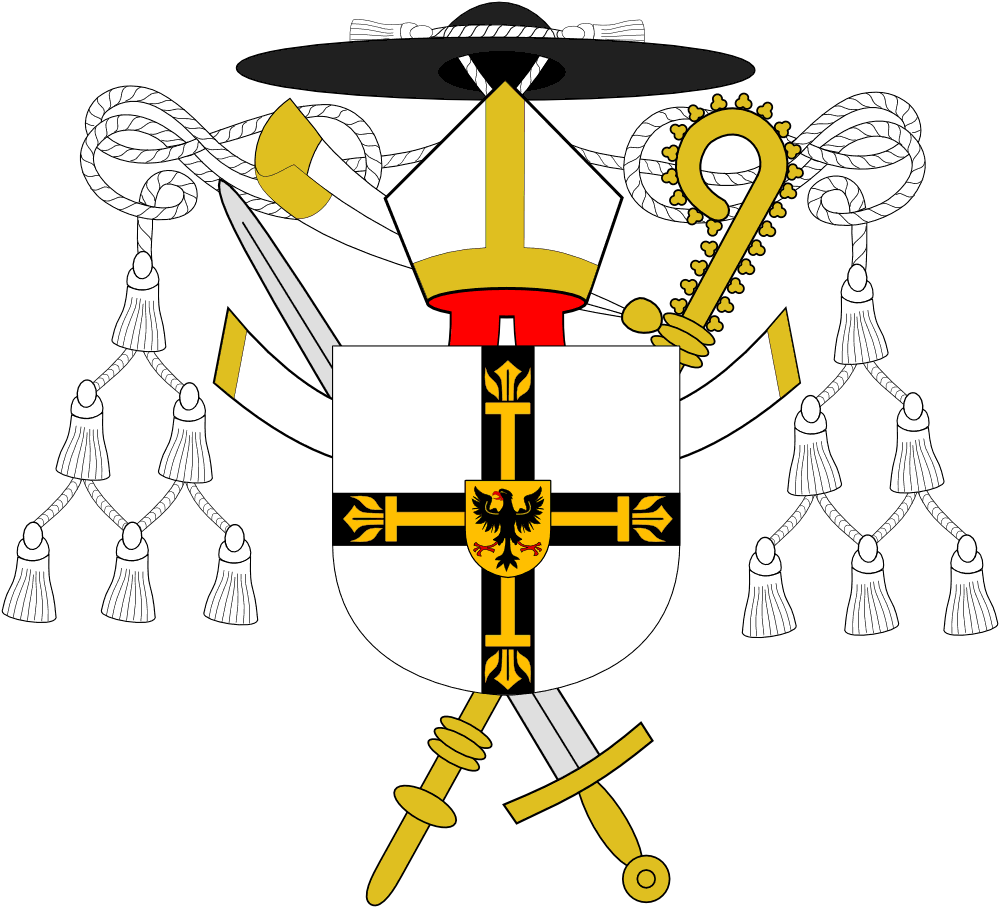 Piotr Jaworski; PioM EN DE PL 01:36, 26 July 2005 (UTC); POLAND/Poznań; COAT OF ARMS of Teutonic Order (DE: Deutscher Orden, PL: Krzyżacy); License for file